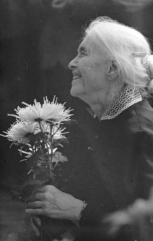 ADN-ZB/Sturm/2.12.75/pe/Berlin: Anna Seghers, Schriftstellerin, Präsidentin des Schriftstellerverbandes der DDR.